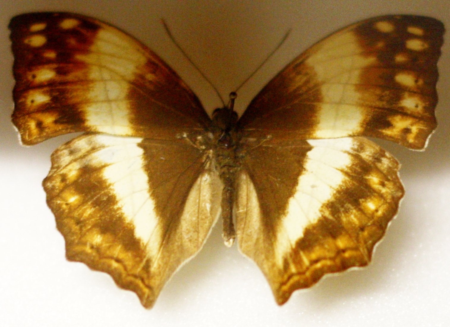 Naturkundliche Sammlung Übermaxx Überseenuseum Bremen; Schmetterlinge und andere Cymothoe theobene Doubleday [1848] Cameroon